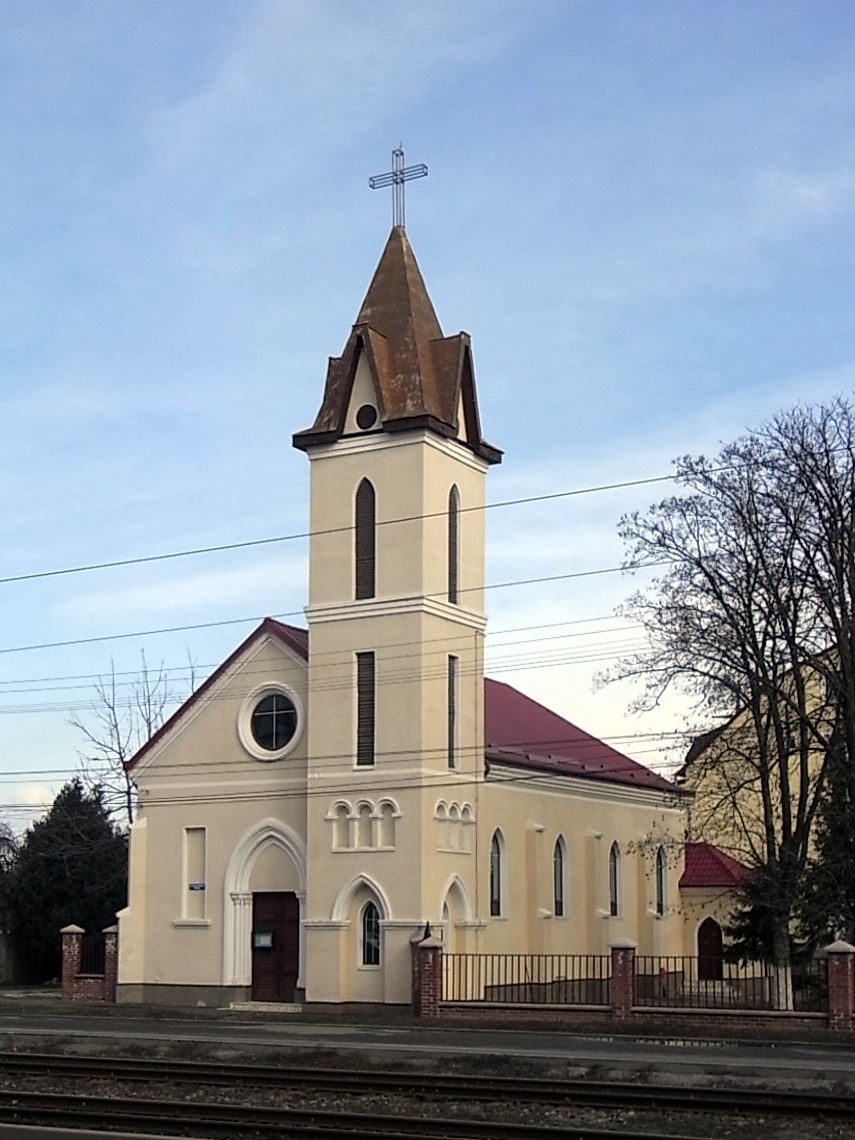 Kirche "Mariä Entschlafen" in Arad, Calea Radnei (RO).